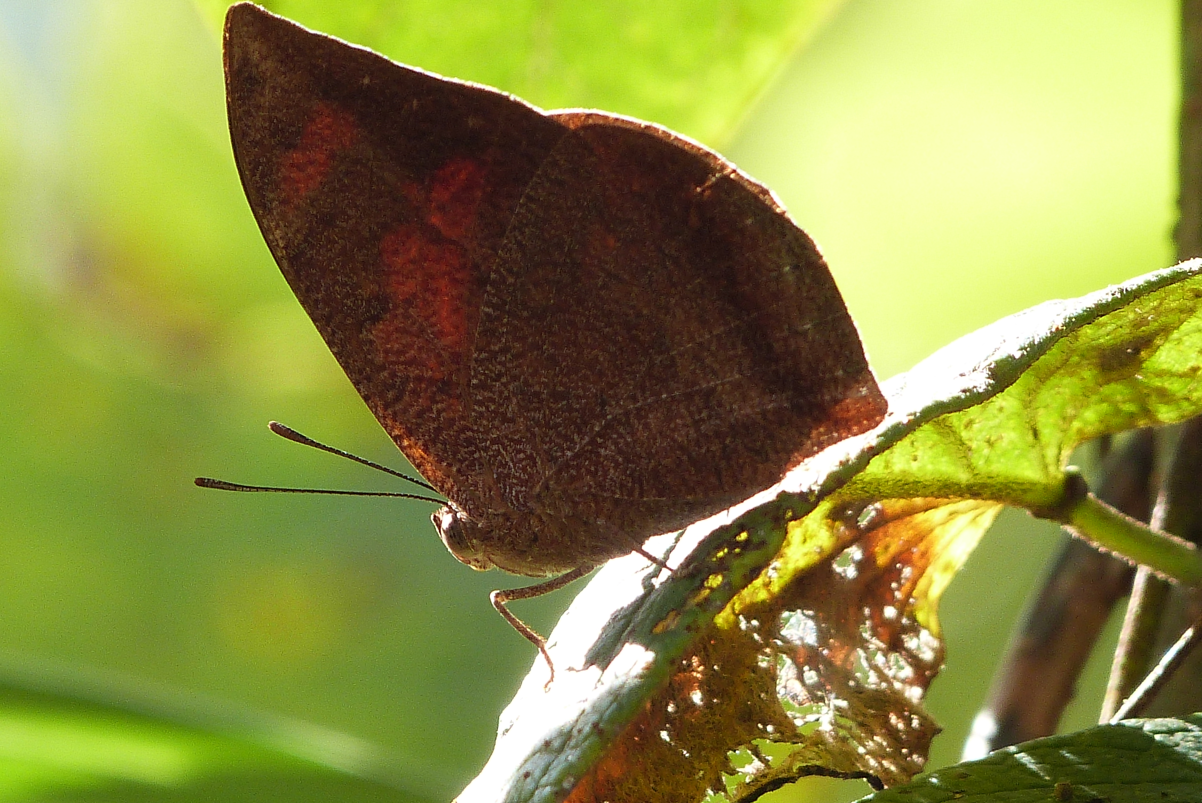 Foto tirada Parque Estadual do Juqueri - SP